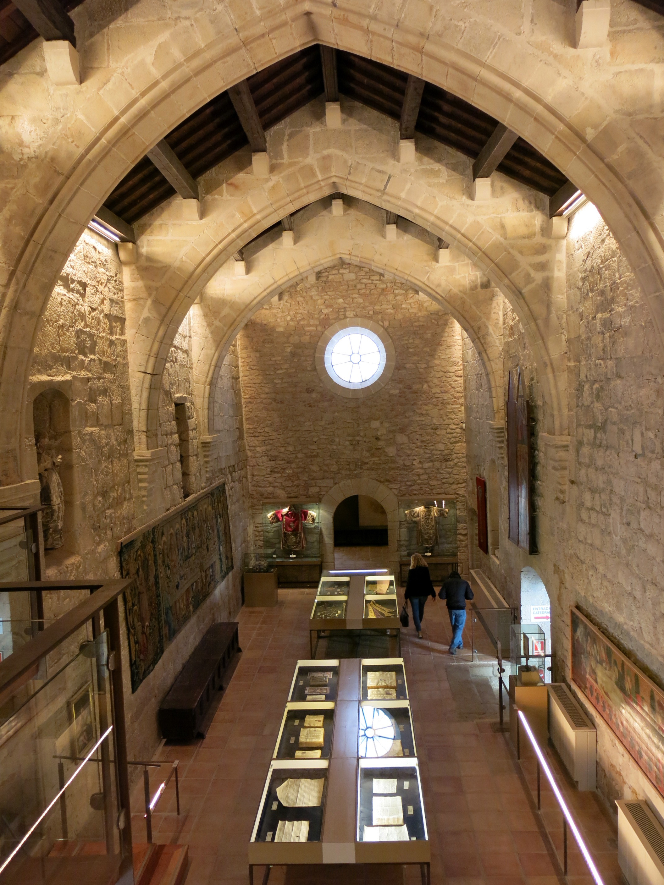 Catedral de Santa Maria (Tortosa)